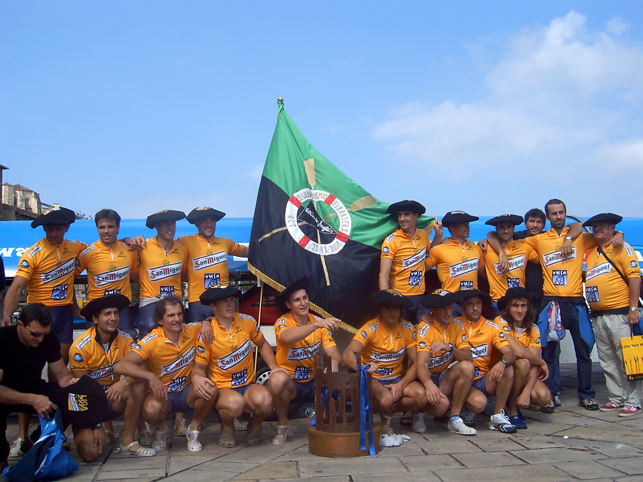 Urdaibai 2007. urteko portugaleteko estropadan